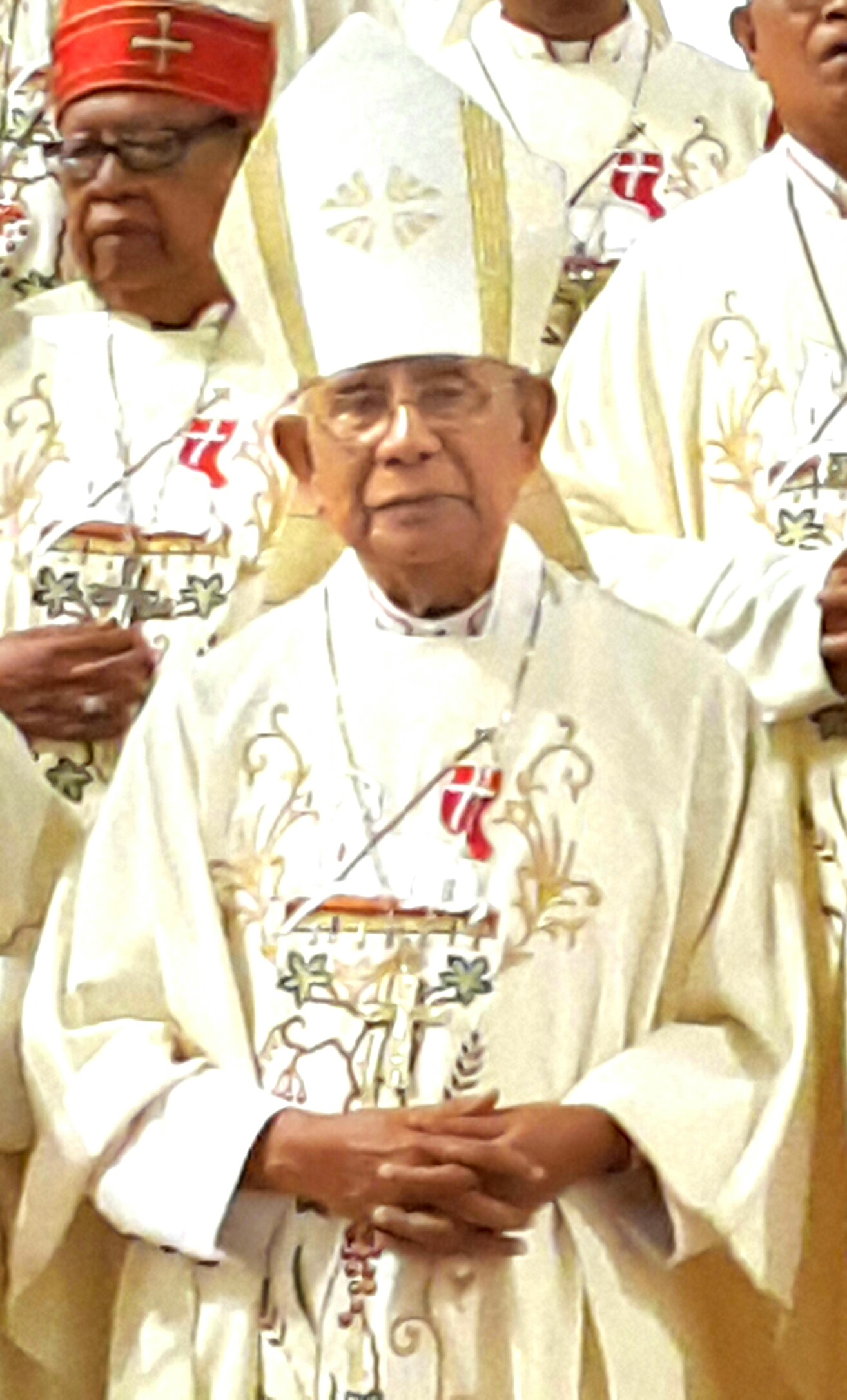 Mgr Gerulfus Kherubim Pareira, Uskup Maumere